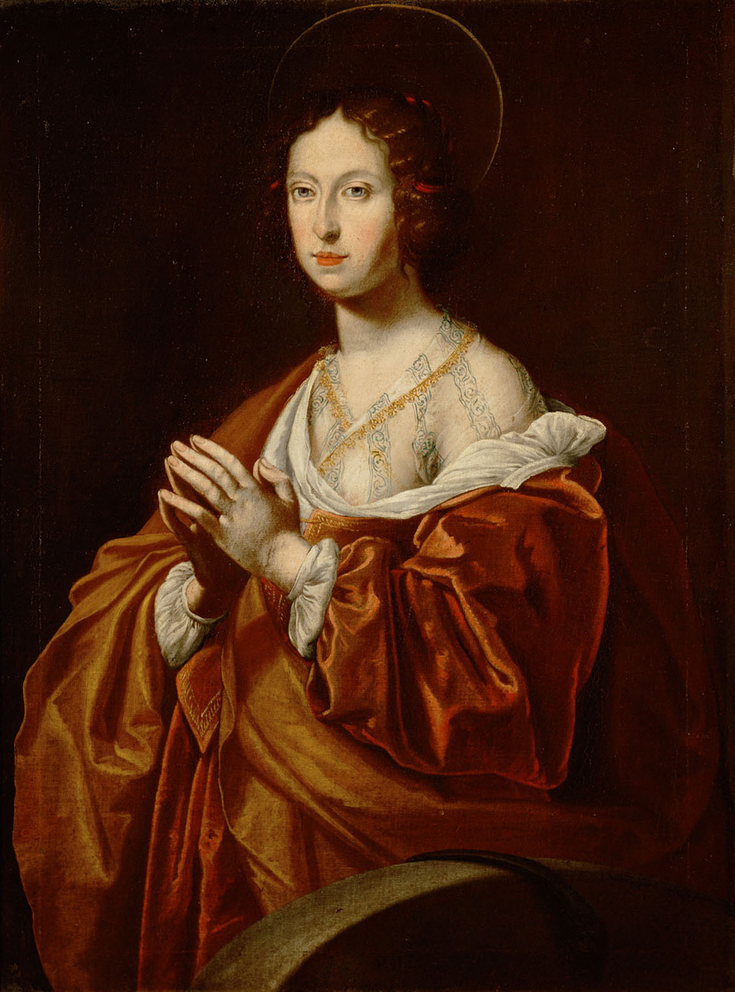 Halbfigur